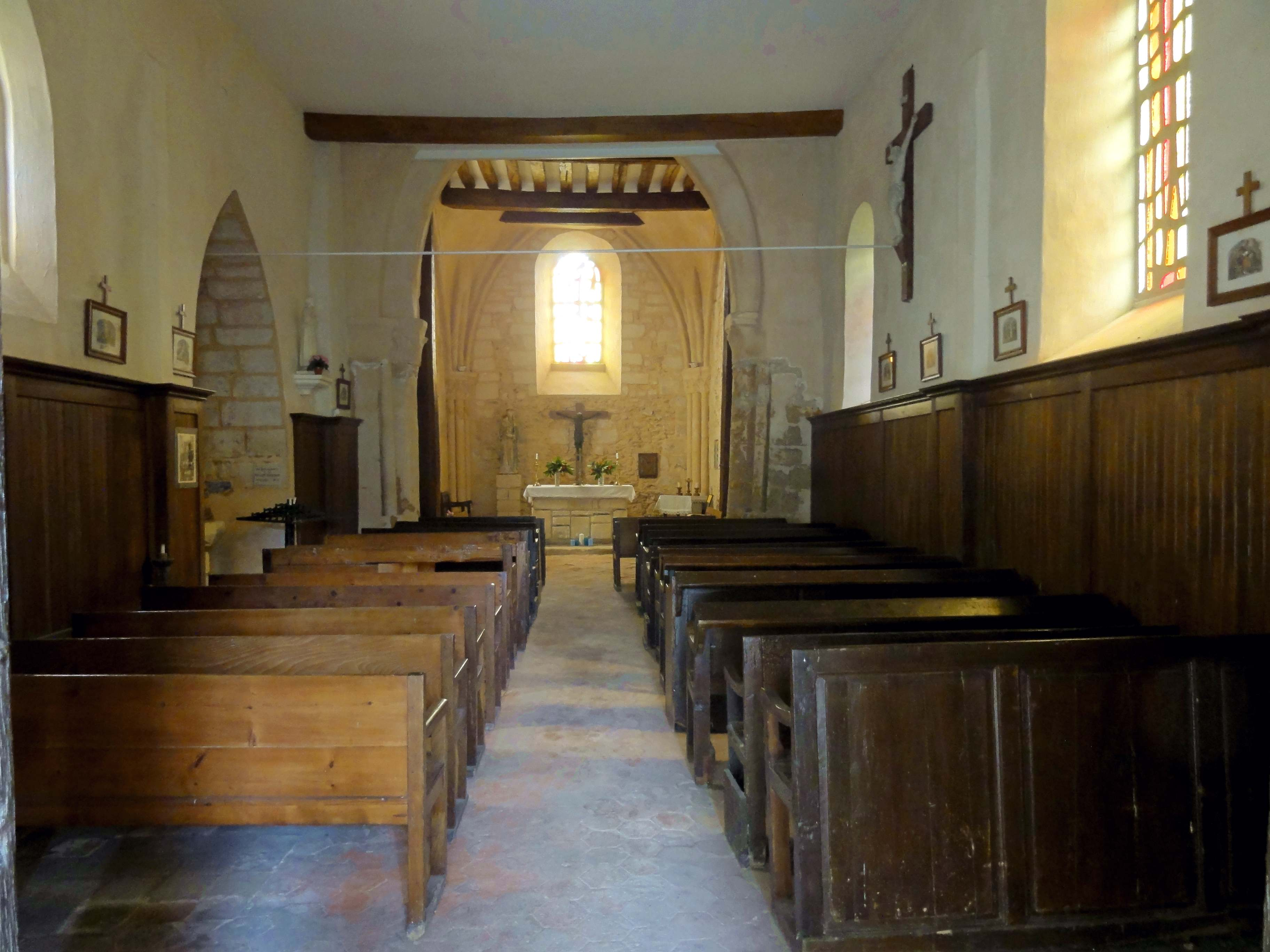 Intérieur de l'église - voir titre.